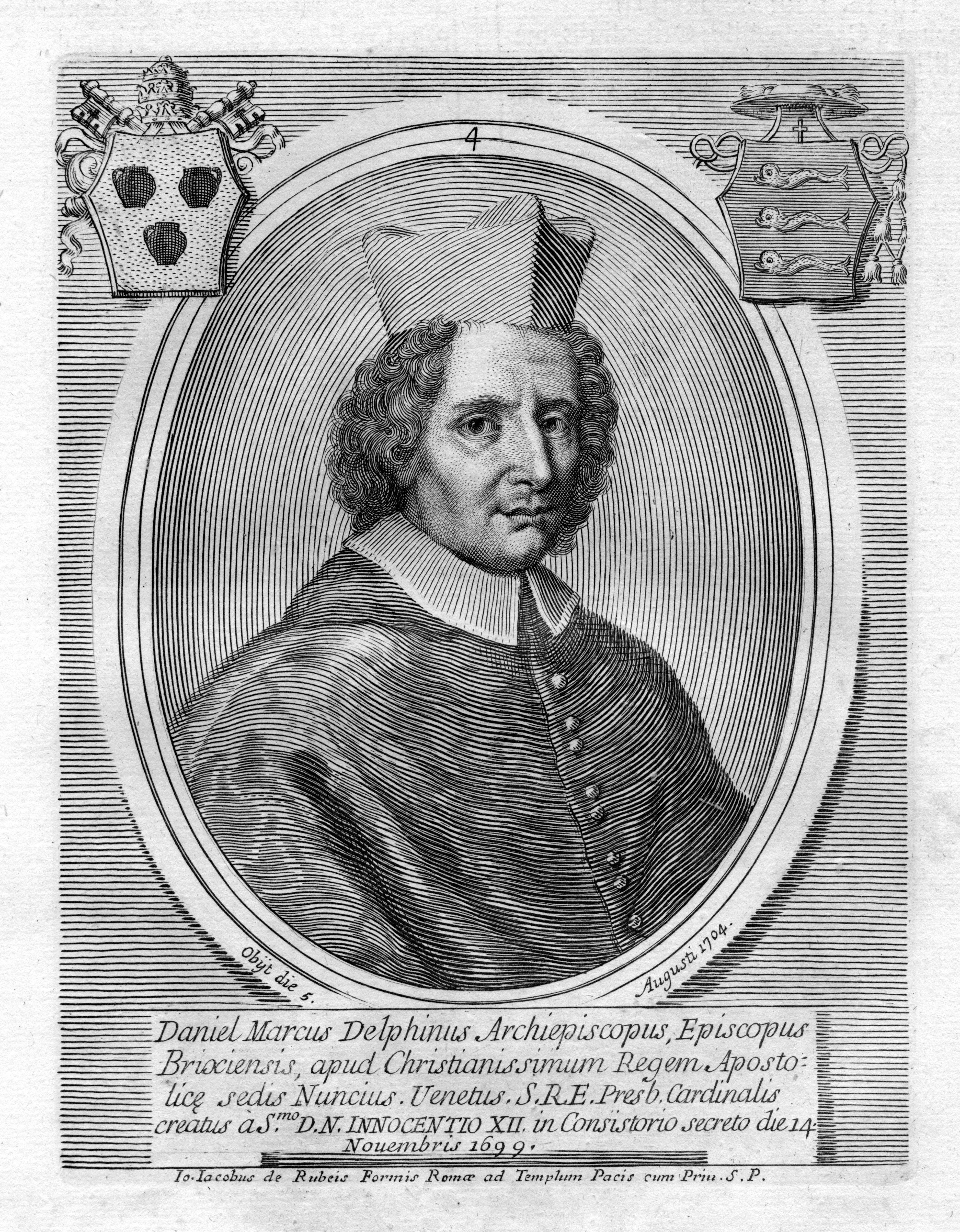 portrait gravé